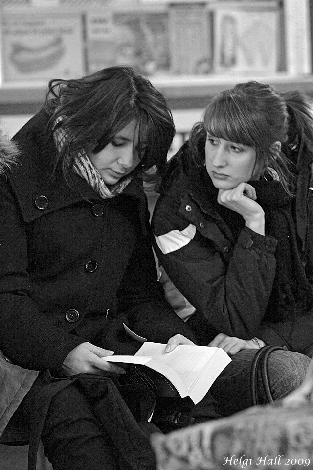 Girlfriends